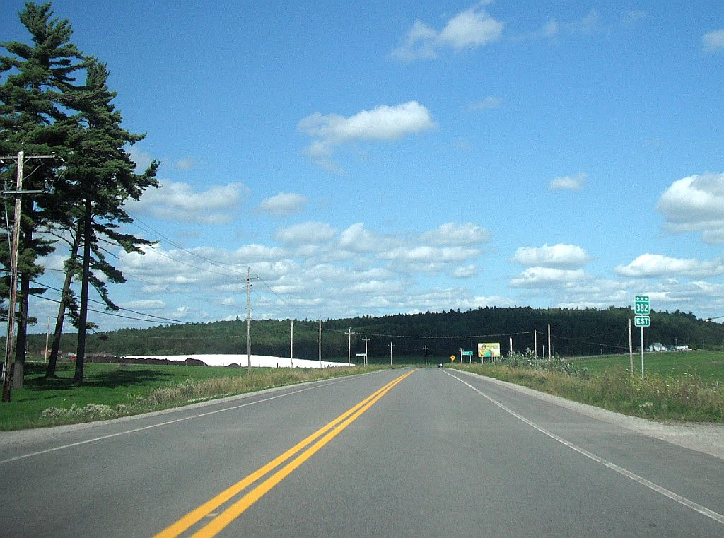 Vue sur la route 382, à Ville-Marie, au Témiscamingue.